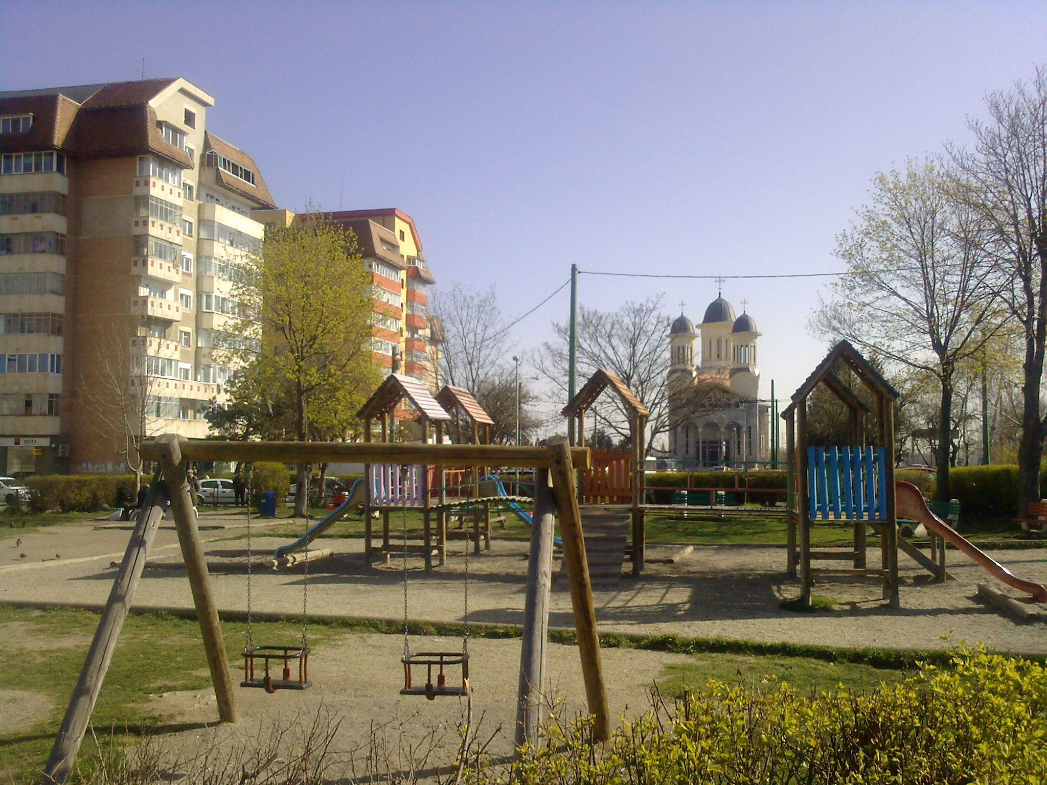 Cartierul Triaj, Braşov, România